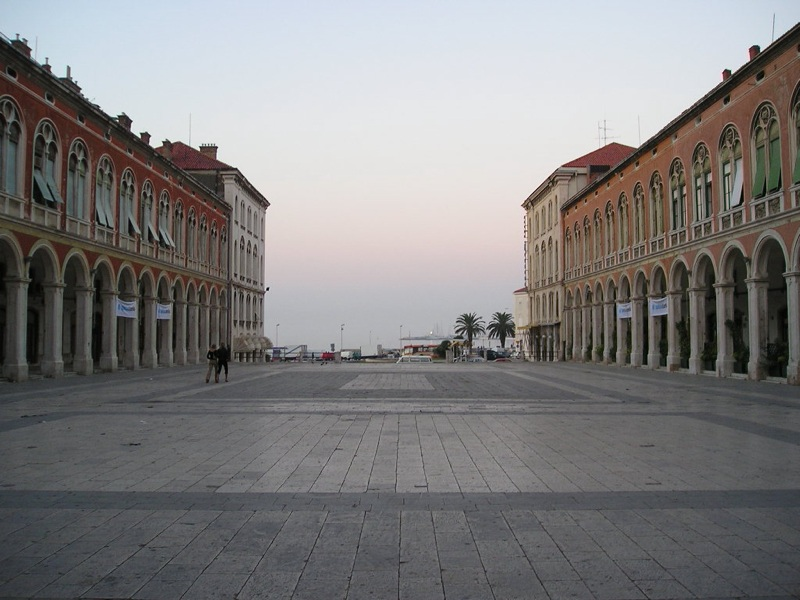 Prokurative-Platz in Split, Kroatien